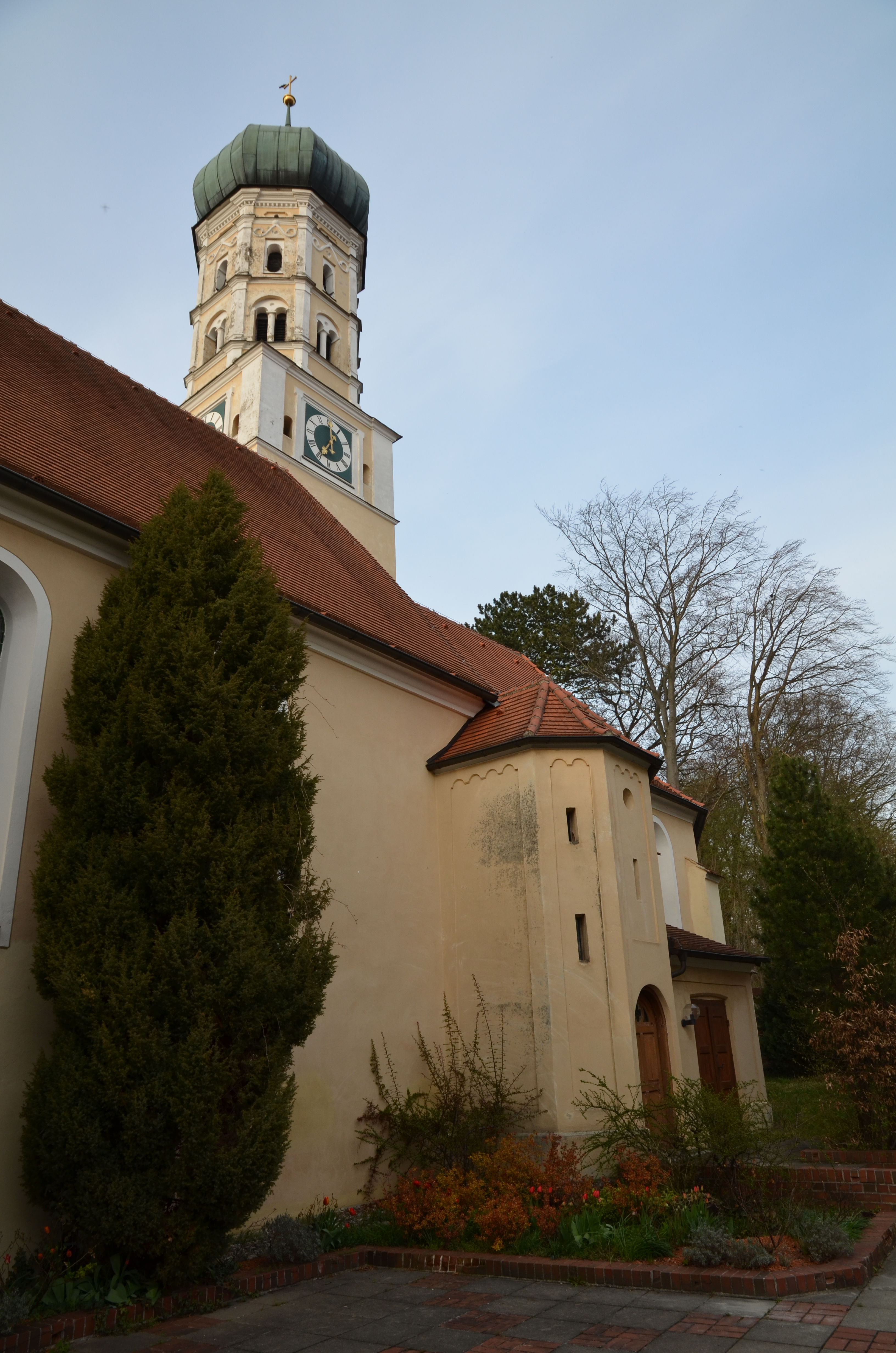 evang.-luth. Johanneskirche in Burtenbach